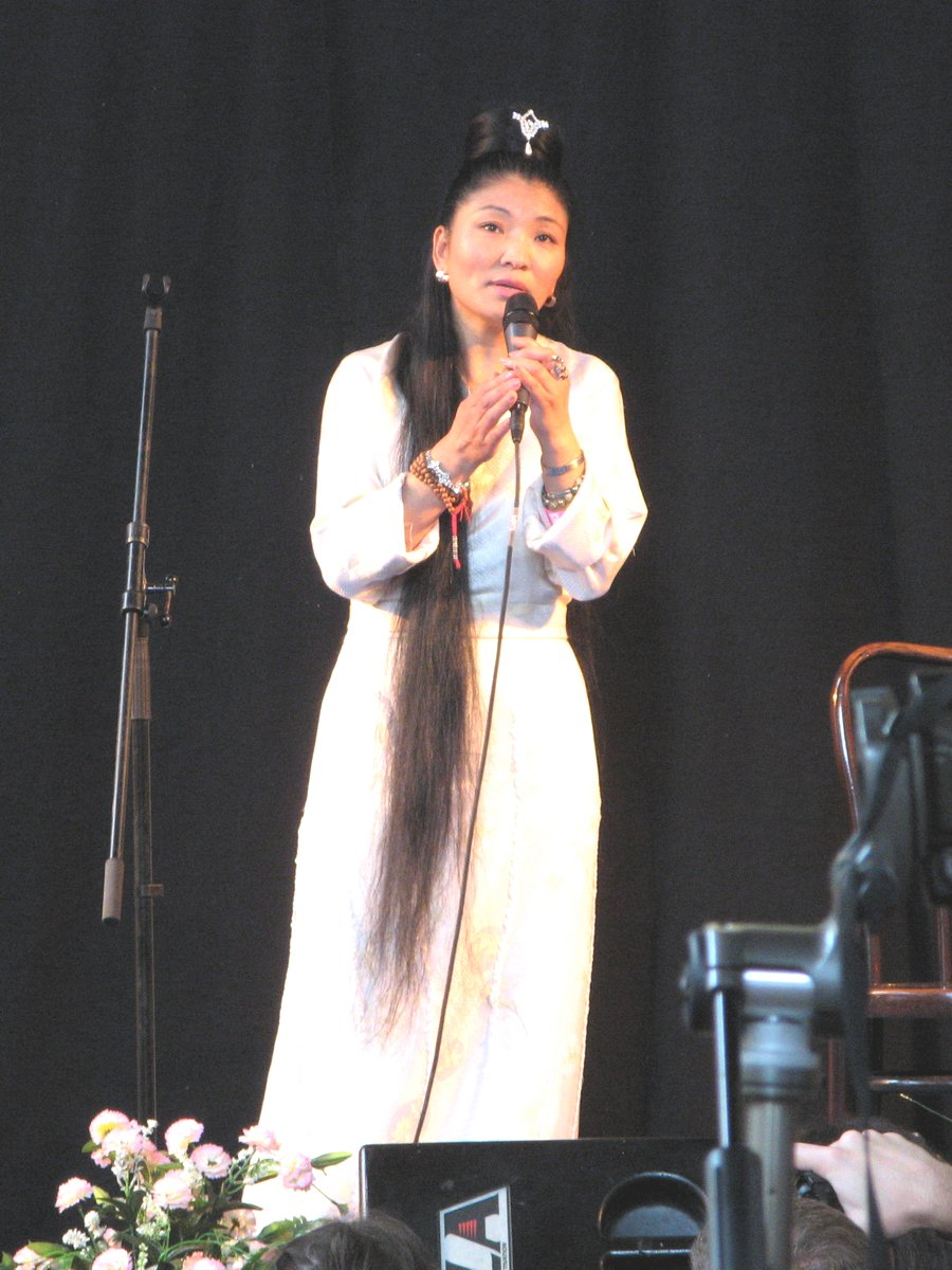 Yungchen Lhamo, 央金拉姆